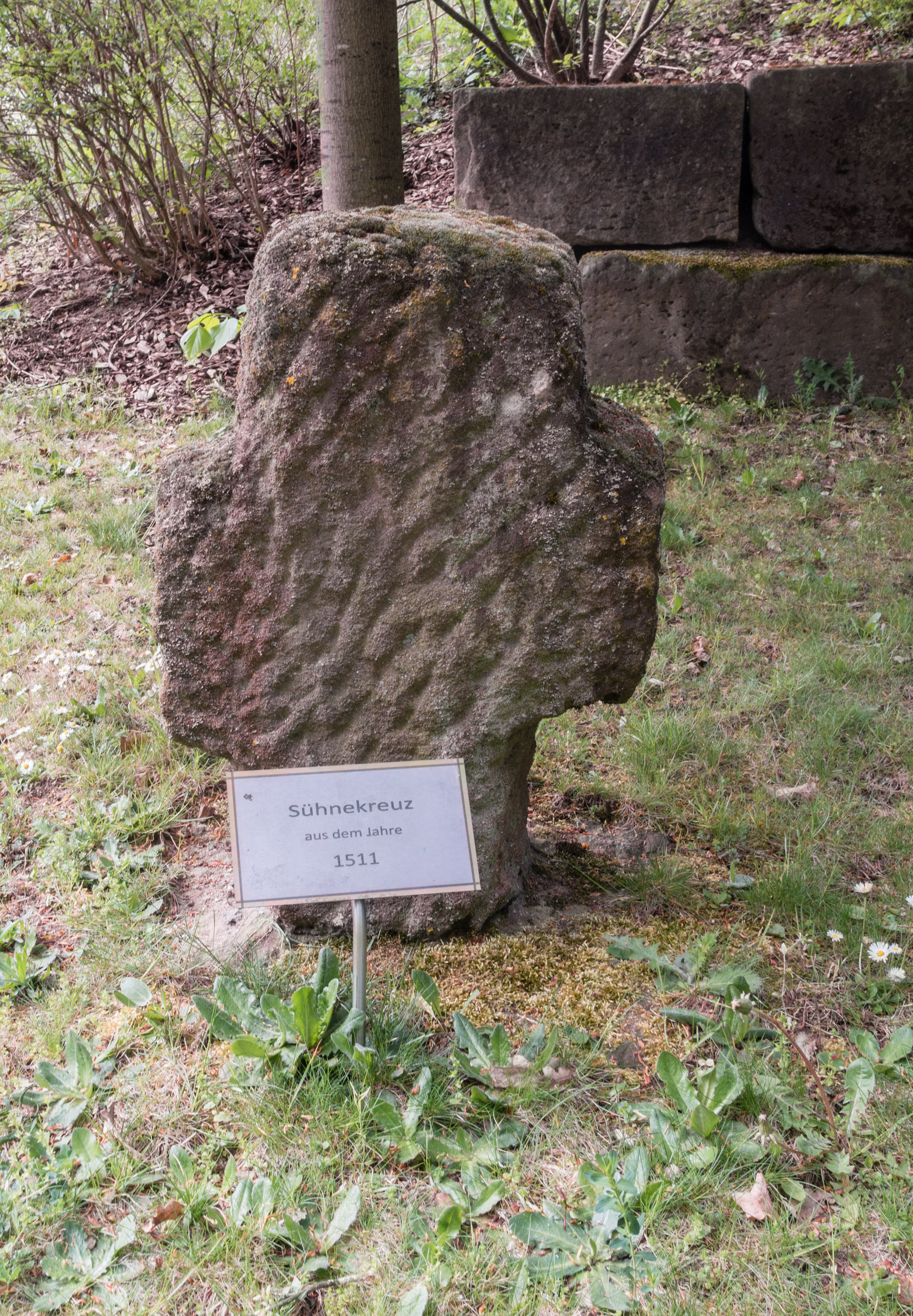 Helmkreuz, Großschwarzenlohe, Vorderseite